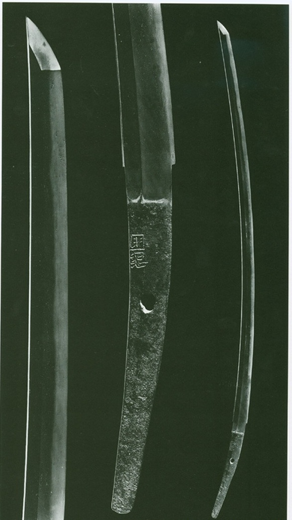 这张图片是鬼丸国纲的实物图